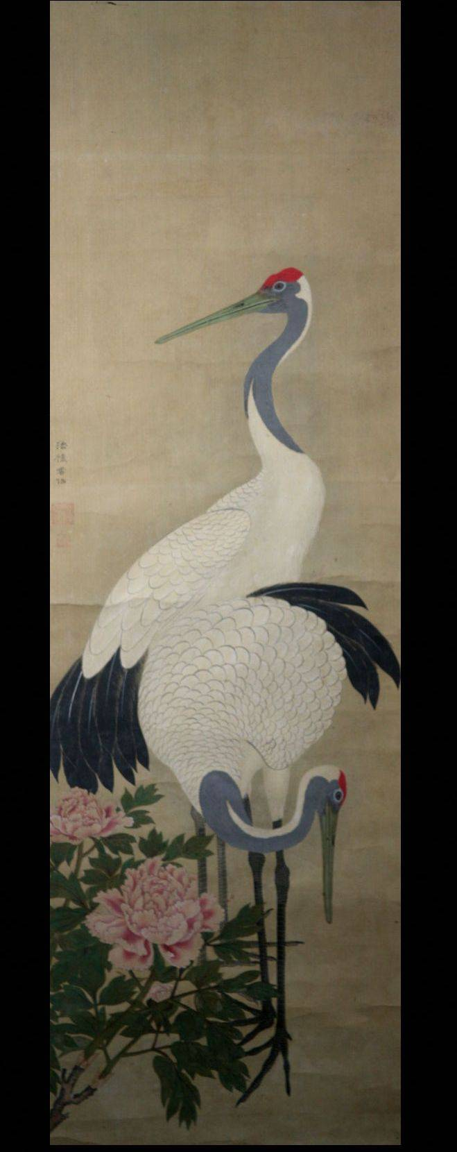 牡丹に鶴之図